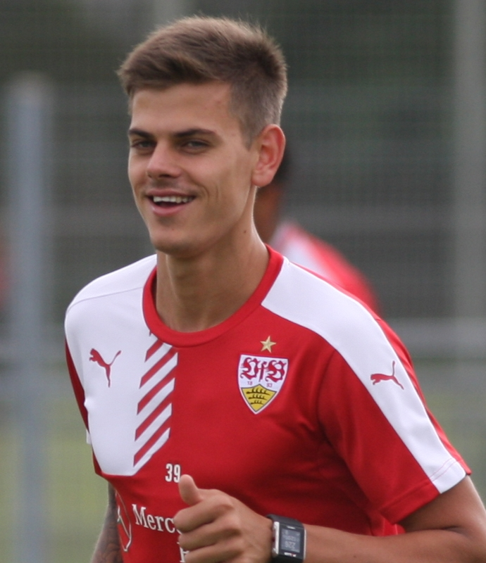 Jan Kliment beim VfB-Training. Aufgenommen von